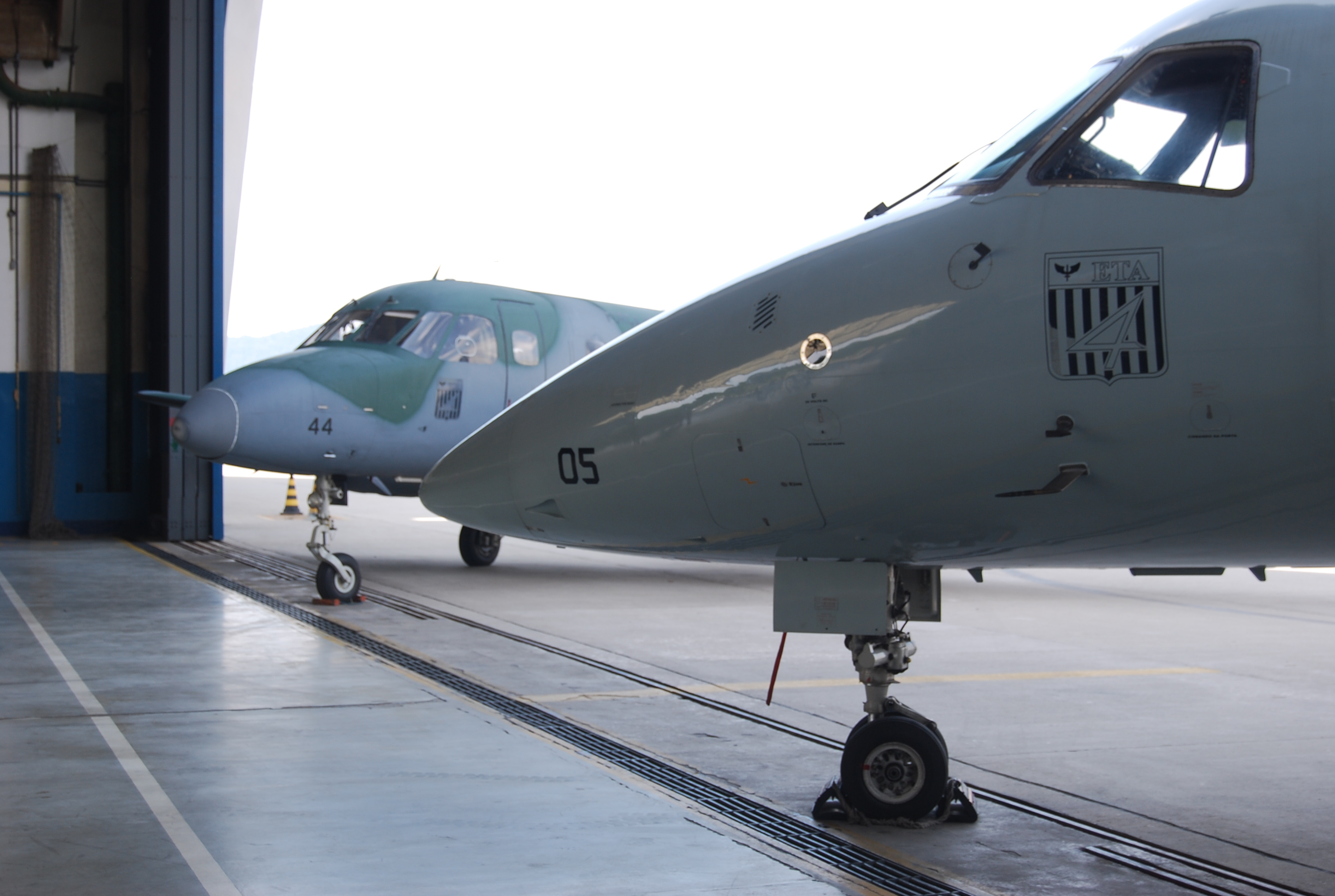 Foto tirada na ocasião da troca de comando do esquadrão em 2015